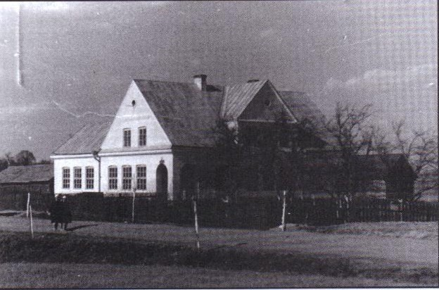 Школа в Черничині. Період міжвоєнний.